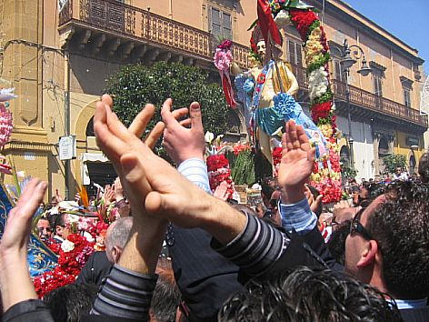 Pasqua: Gesù Risorto. Incontro di Pasqua di Ribera: Gesù Risorto.